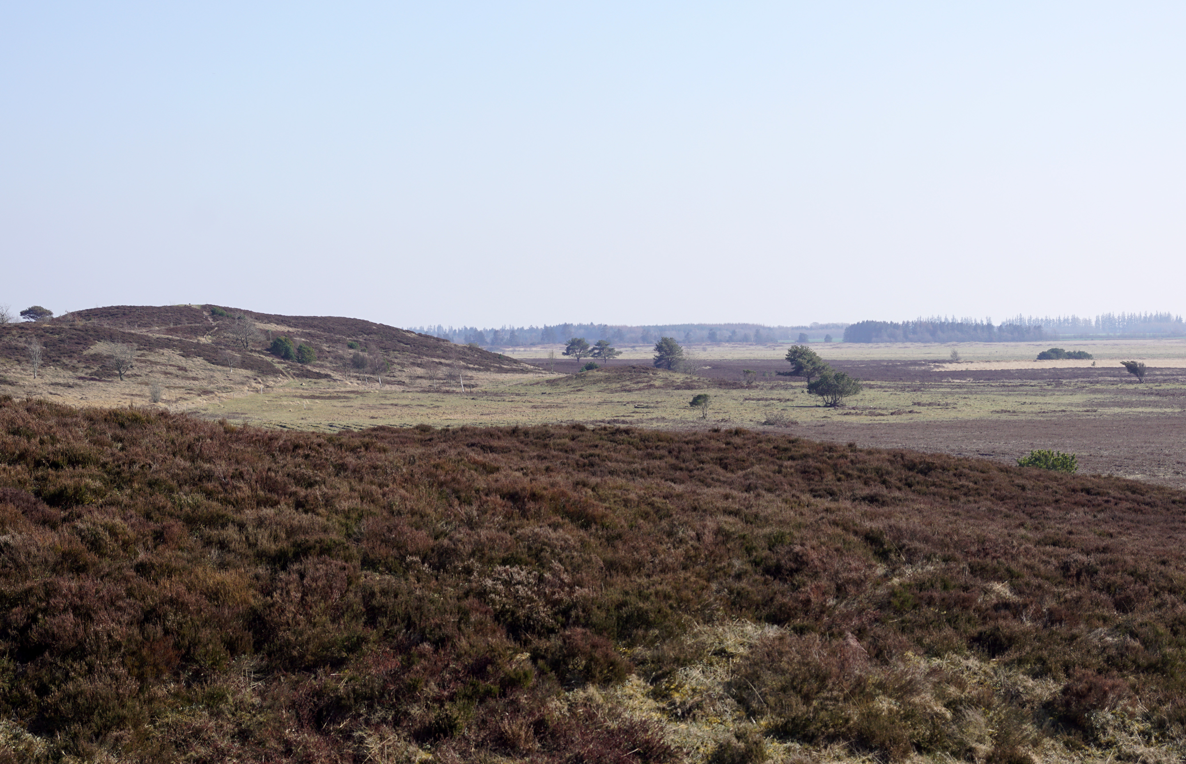 Stoltenbjerg set fra nordvest